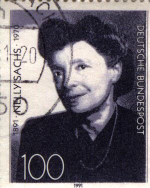 Nelly Sachs (1891–1970), deutsche Dichterin